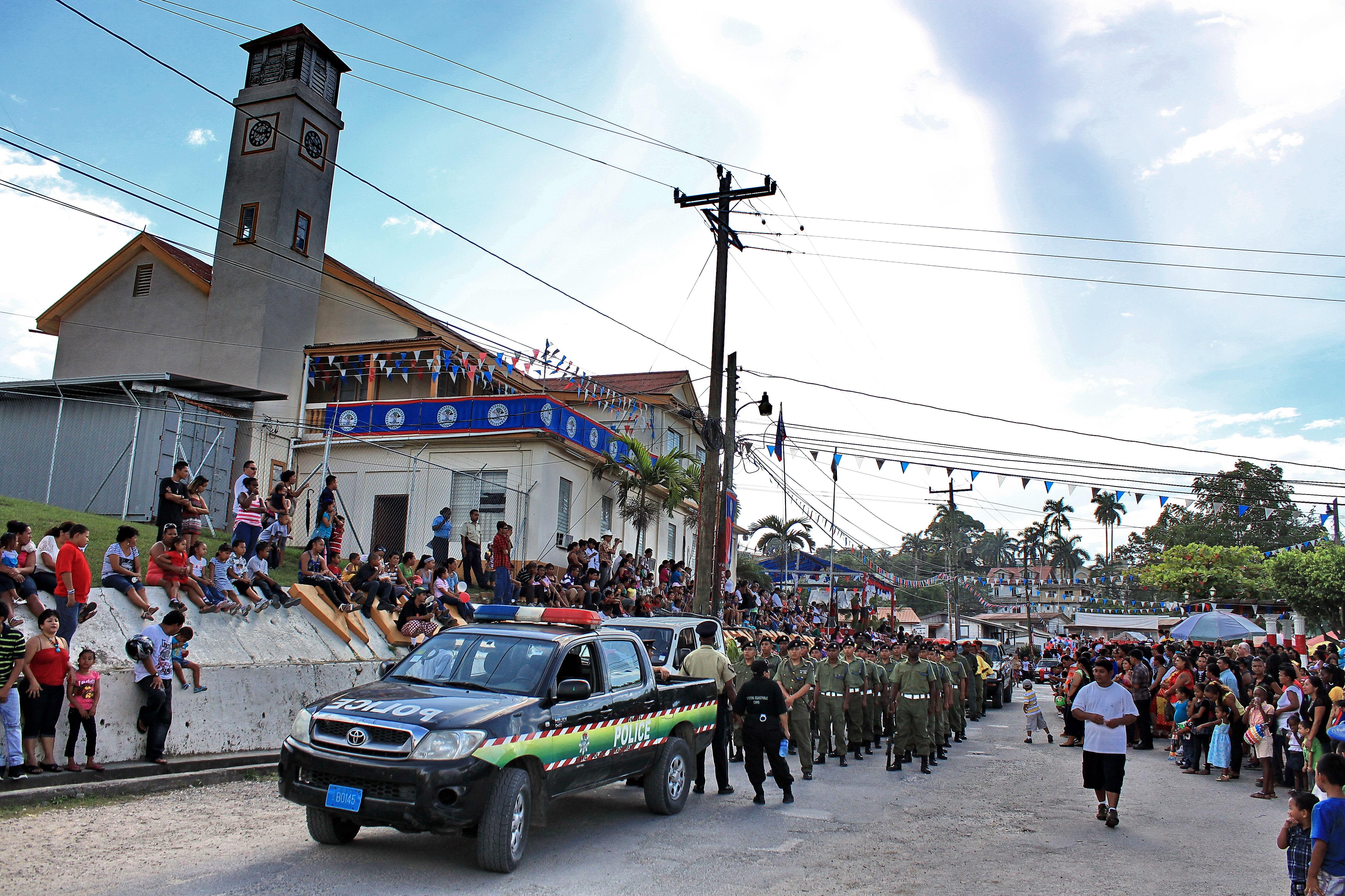 belize independence day celebration sept.21 2012